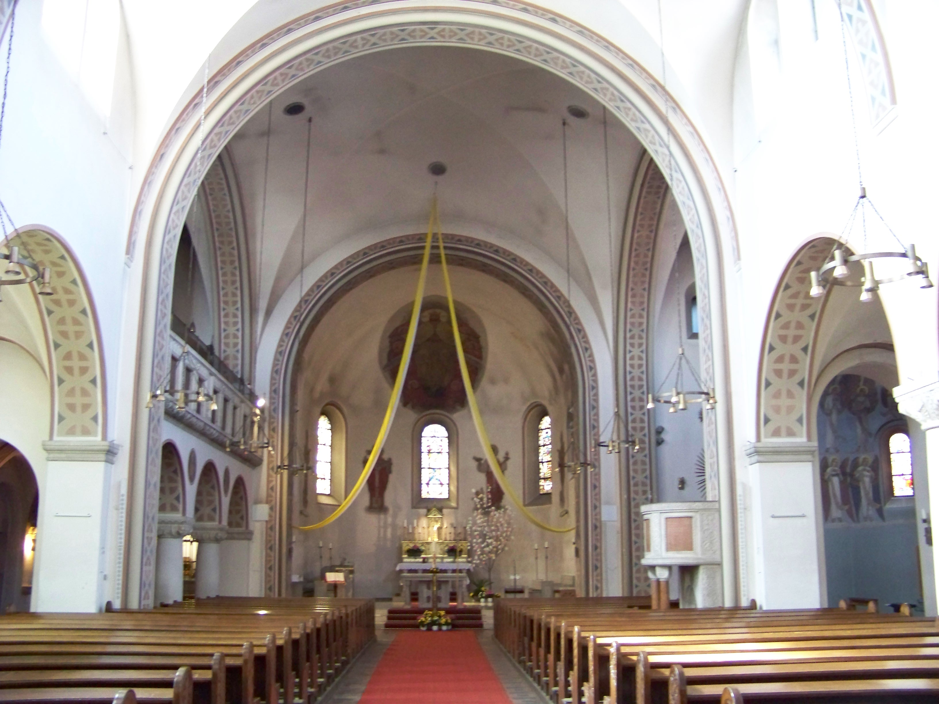 Regensburg Reichstraße 12, Kirche St. Cäcilia. Die Kirche ist eine dreischiffige, nach Süden ausgerichtete neuromanische Basilika mit eingezogenem Chor und Querhaus.